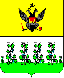 Герб Могилів-Подільського 1796 року